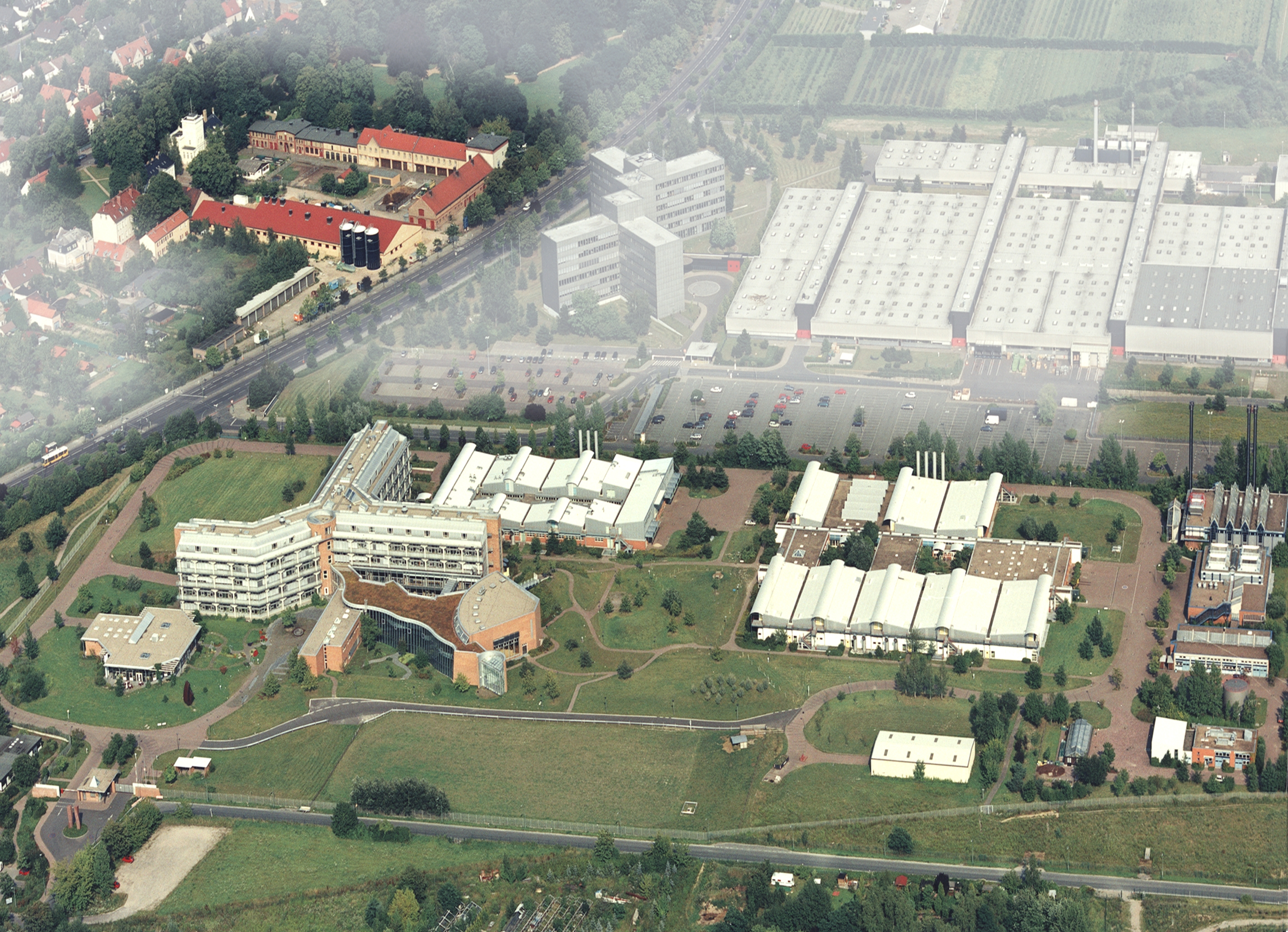 Luftbild des BfR-Standortes in Berlin-Marienfelde